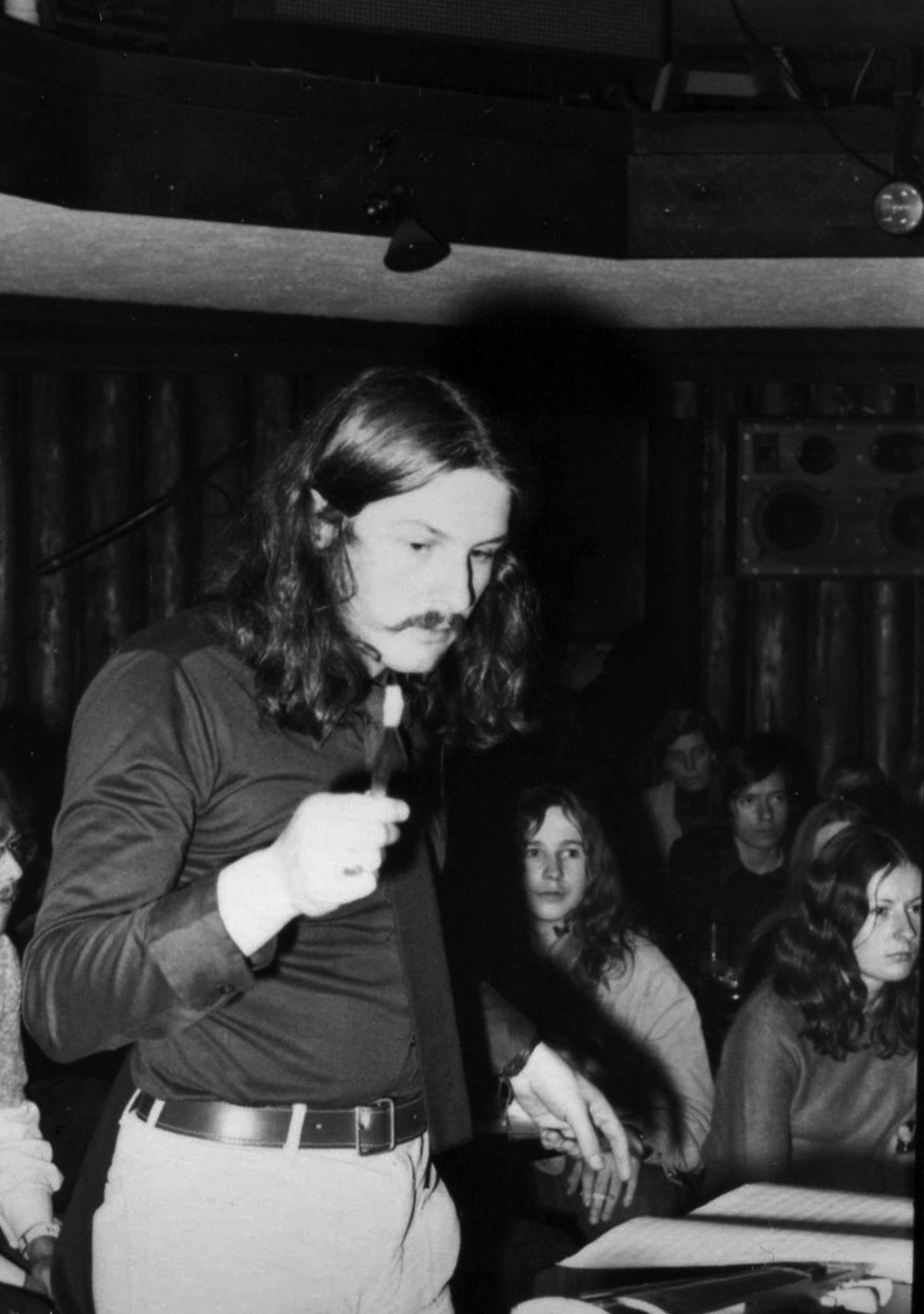 Dirigent Steff Signer anlässlich eines Konzerts der Band Infra Steff's Jazz Futztz im Szene-Lokal Africano am 18. Januar 1973